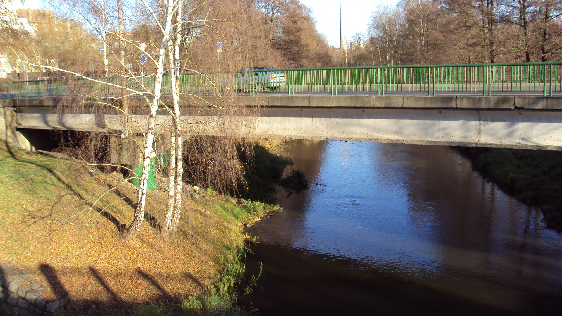 Silniční most přes Ploučnici pod nemocnicí v České Lípě